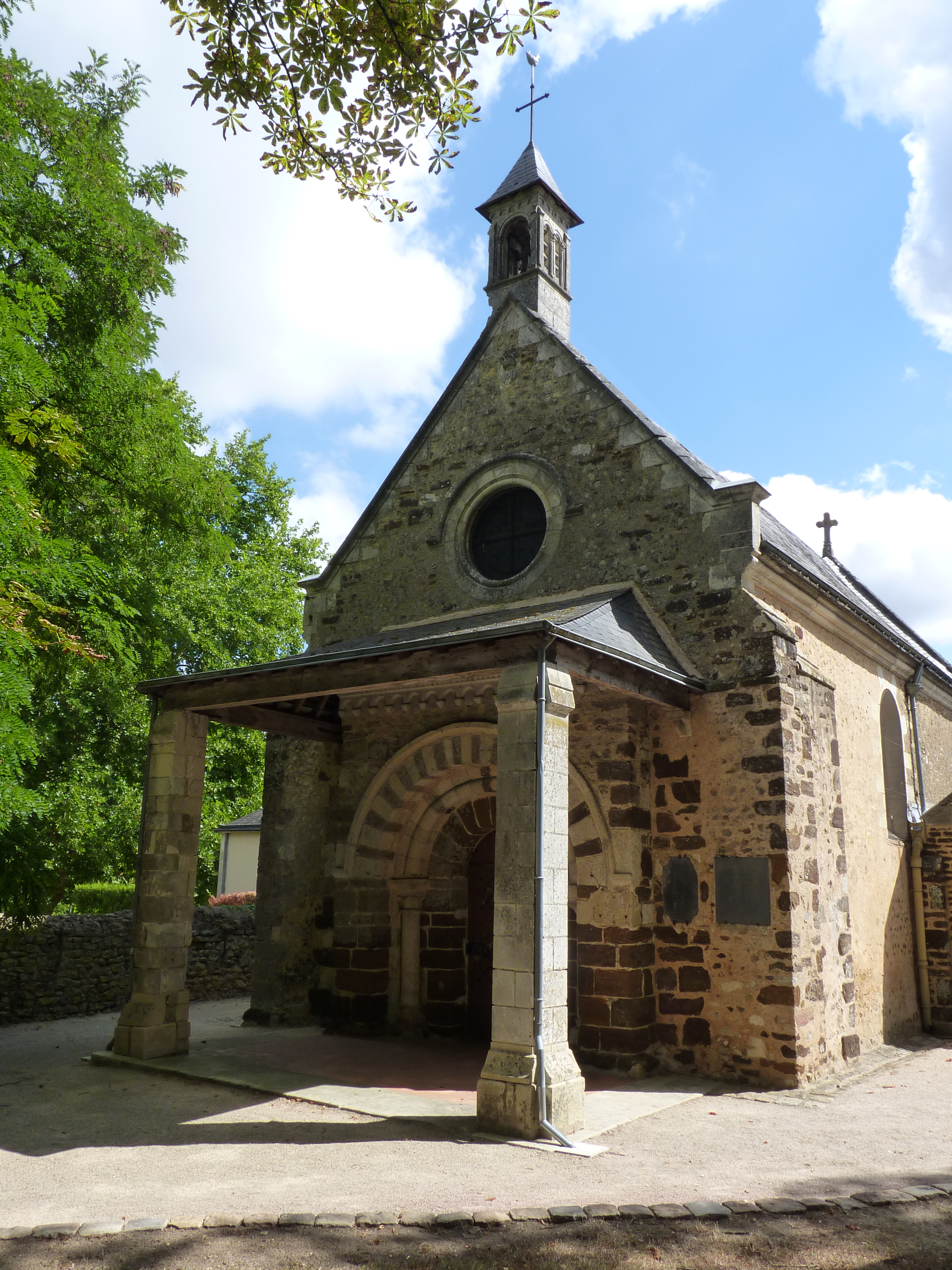 Sarthe - La Flèche - Chapelle Notre Dame des Vertus